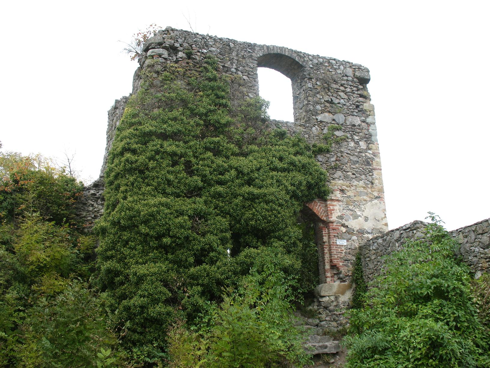 Kapelle der Burg Mägdeberg: Ursulakapelle